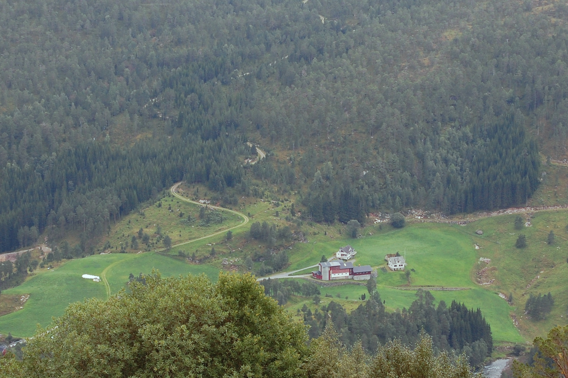 Gårdsbruket Øykjebotn (Indre Eldal) i Viksdalen, Gaular kommune